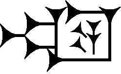 Cuneiform sign